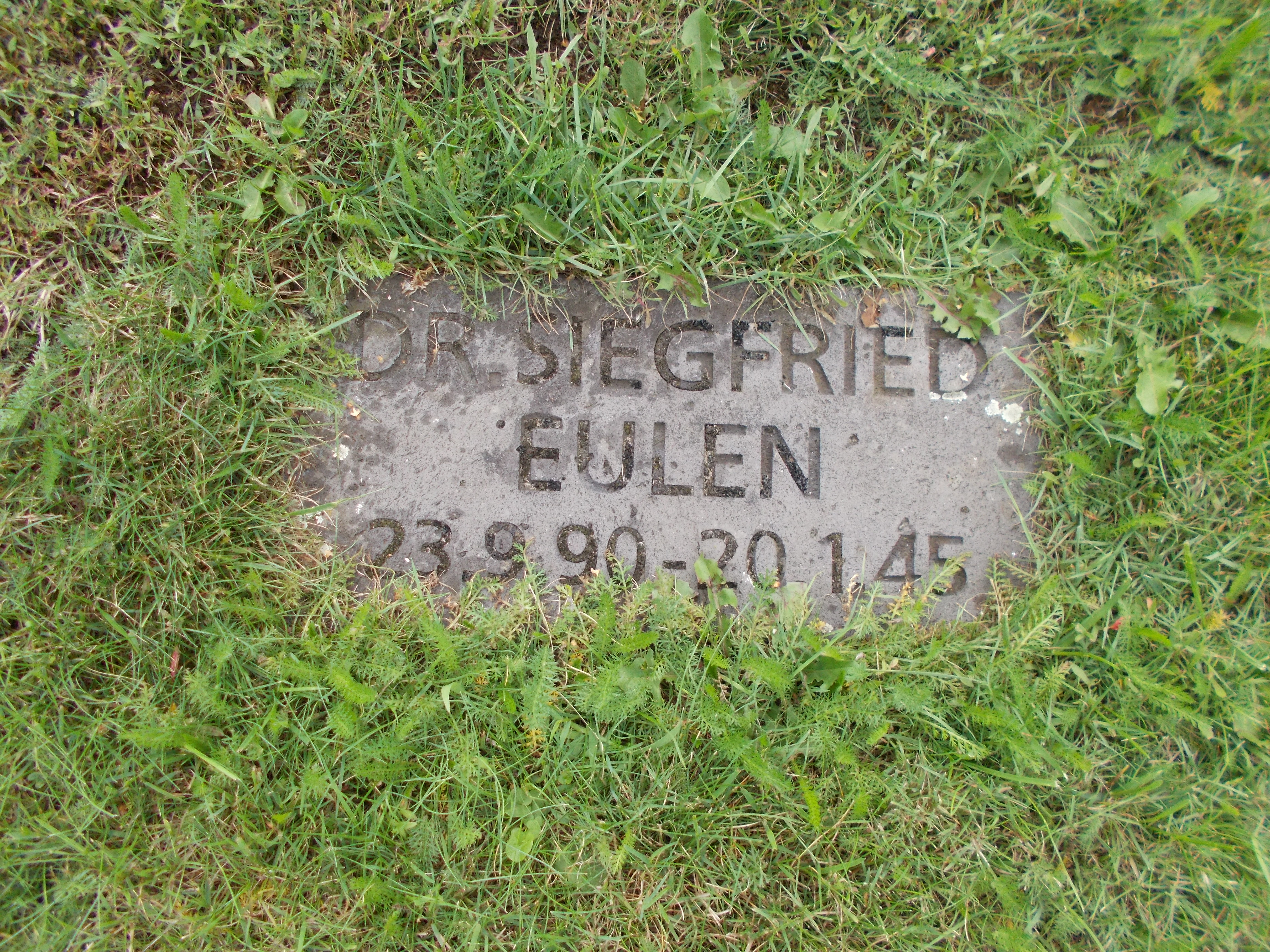 Rasengrab des Volksbundgründers Dr. Siegfried Emmo Eulen.